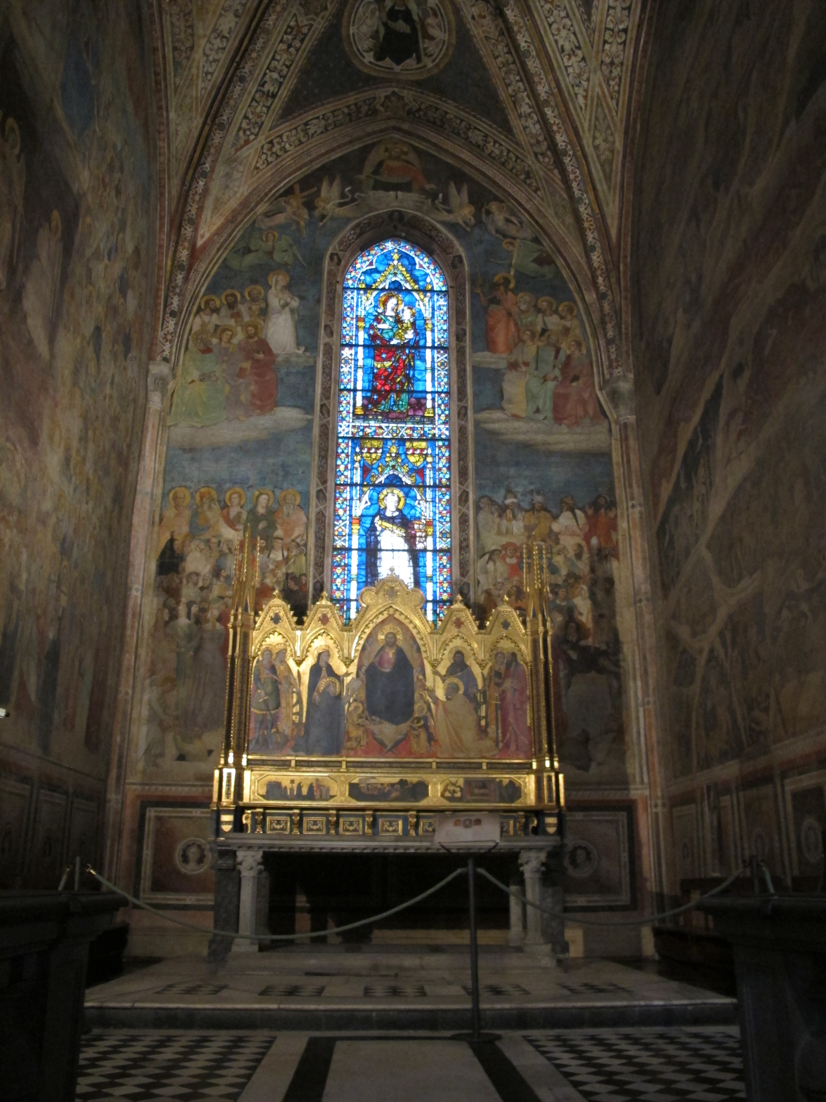 Cappella strozzi di mantova 01.1